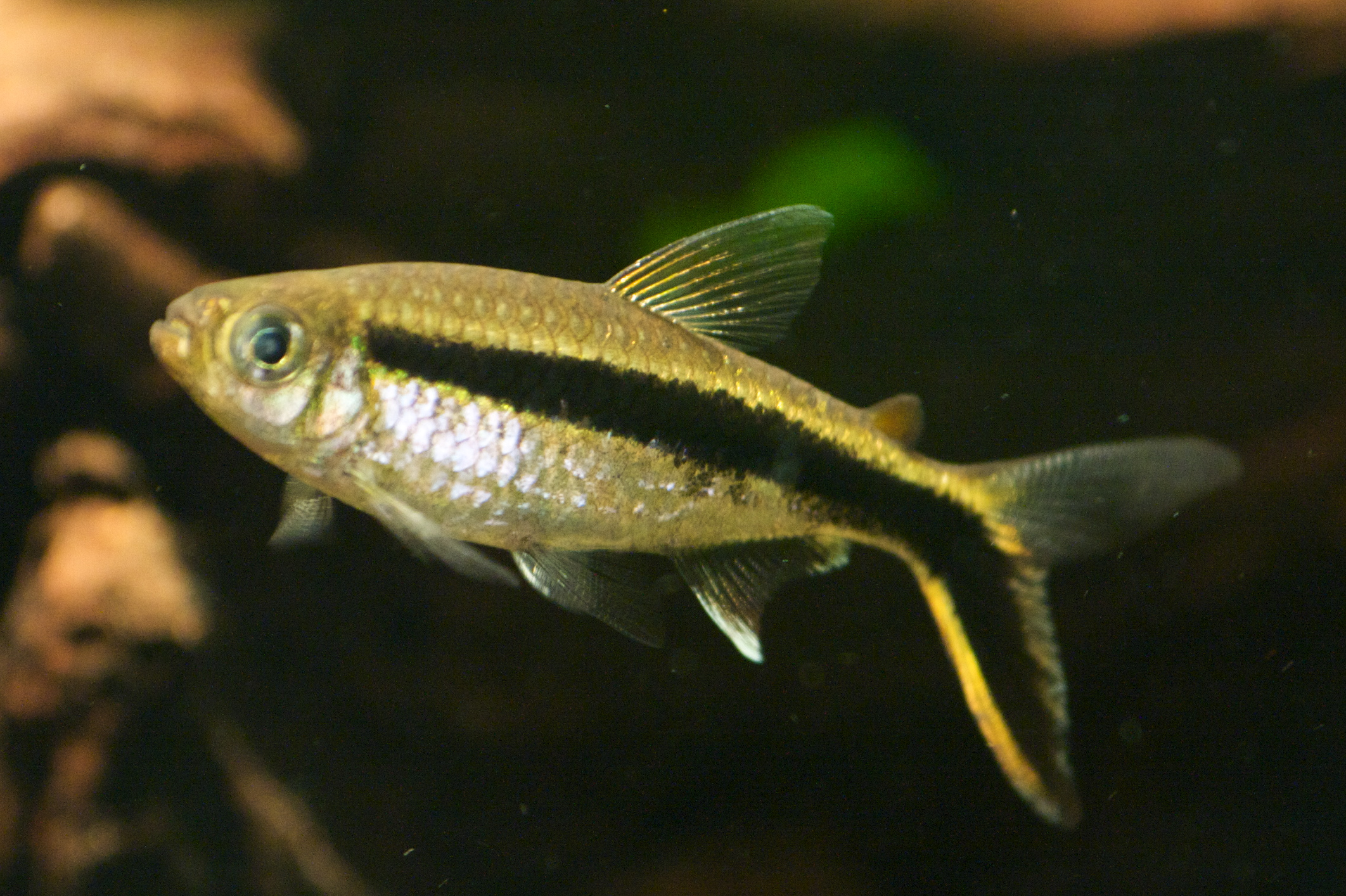 Penguin Tetra (Thayeria boehlkei)